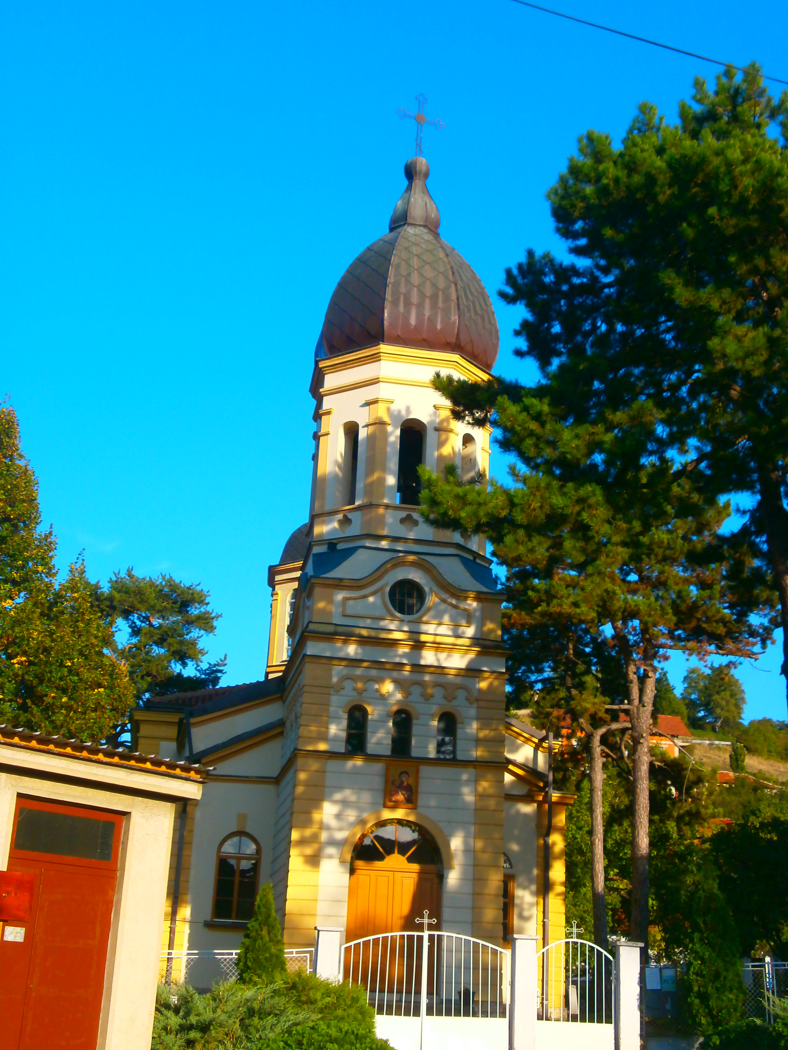 Srpski (latinica): Dimitrovgrad